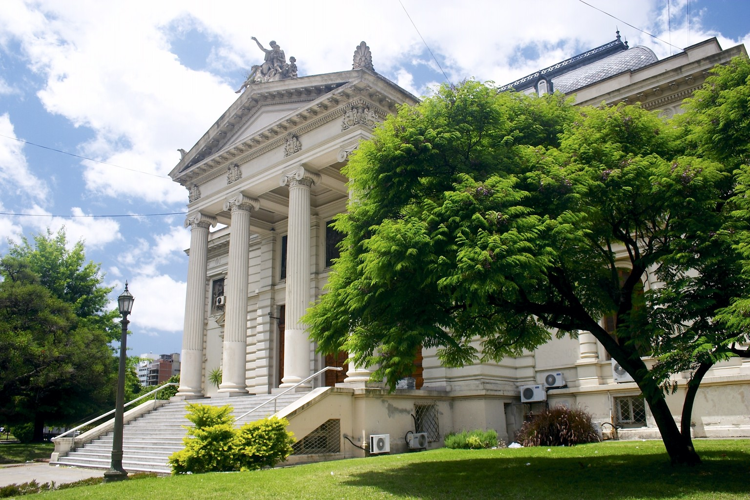 Legislatura de la Provincia de Buenos Aires, en La Plata, Argentina. Entrada sobre calle 51.